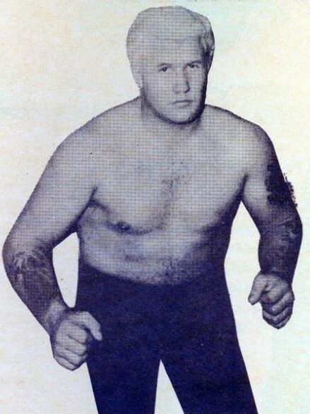 Harley Race en couverture du magazine de catch Wrestling News de juillet 1968